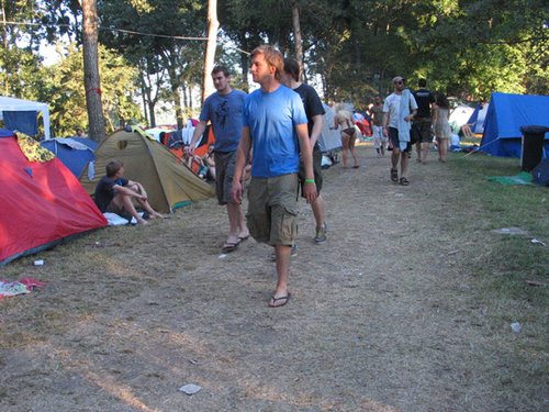 Camp during EXIT 007